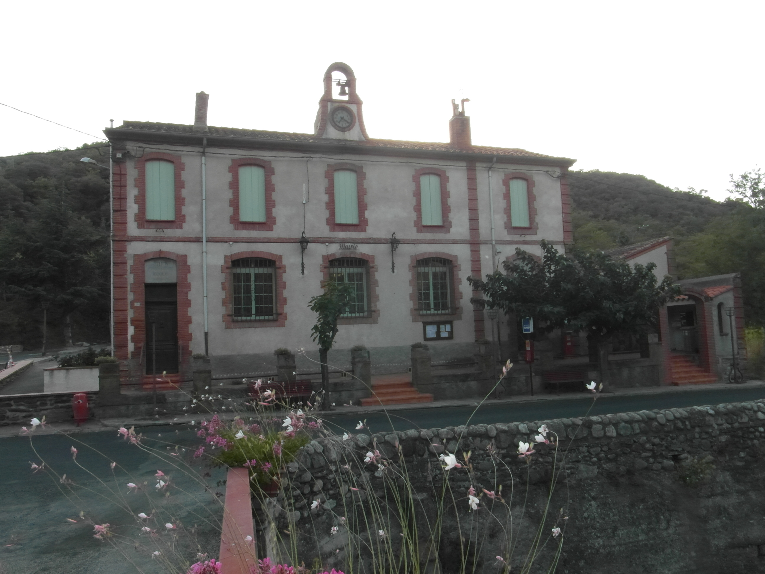 Mairie de Saint-Michel-de-Llotes